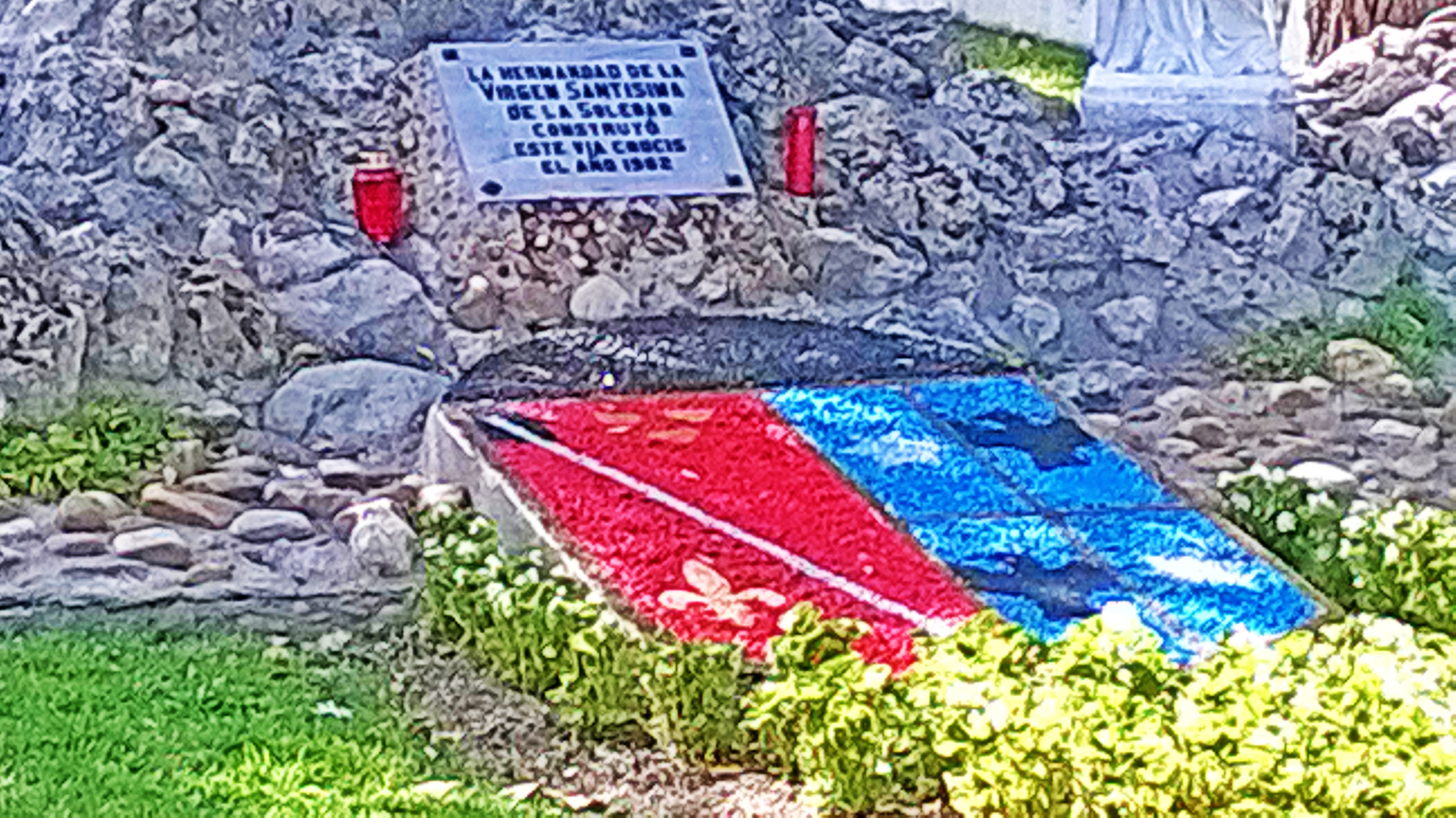 placa del monumento al calvario y escudos. La Parte roja representa el escudo que usaba Bartolomé Hurtado, como firma de sus obras, así por ejemplo lo incorpora la Ermita de nuestra señora de la Soledad de Parla y su casa de recreo en Parla.